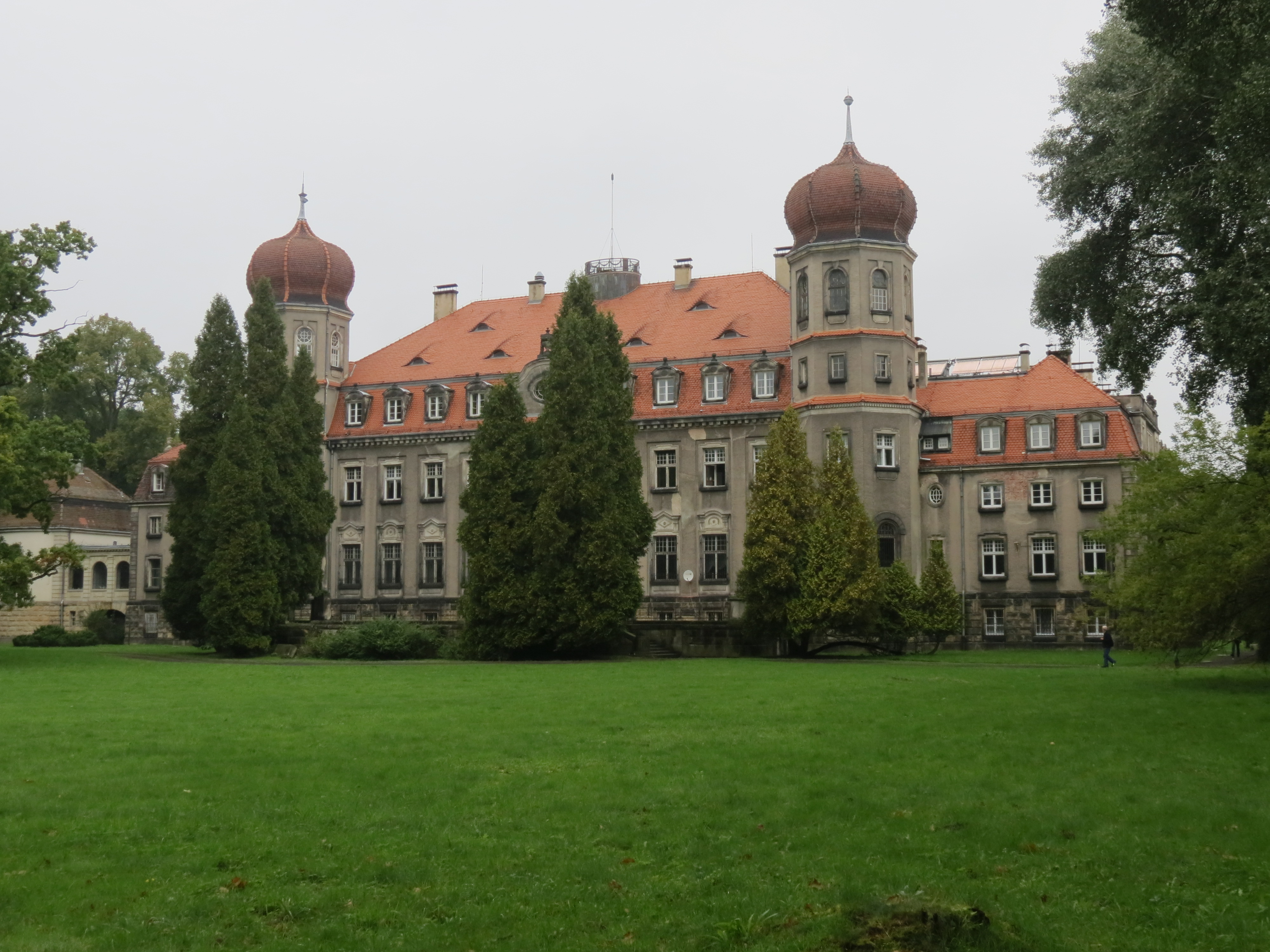 Brynek, pałac, XIX, pocz. XX w.